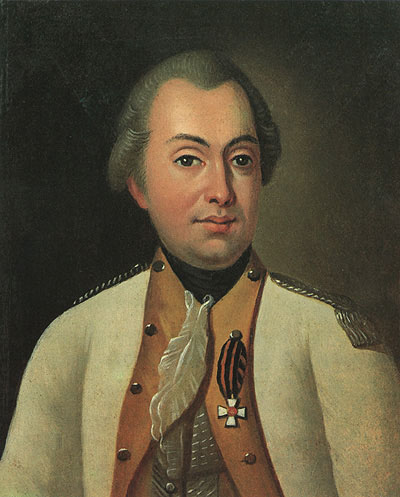 Portrait of russian general M.I. Kutuzov made by unknown painter in around 1777 О. И. Брож, копия с портрета кисти Ротари из собрания Музея-панорамы Бородинской битвы. Картон, масло. II-я половина XIX в. ОФ-1784 музей-панорама "Бородинская битва"